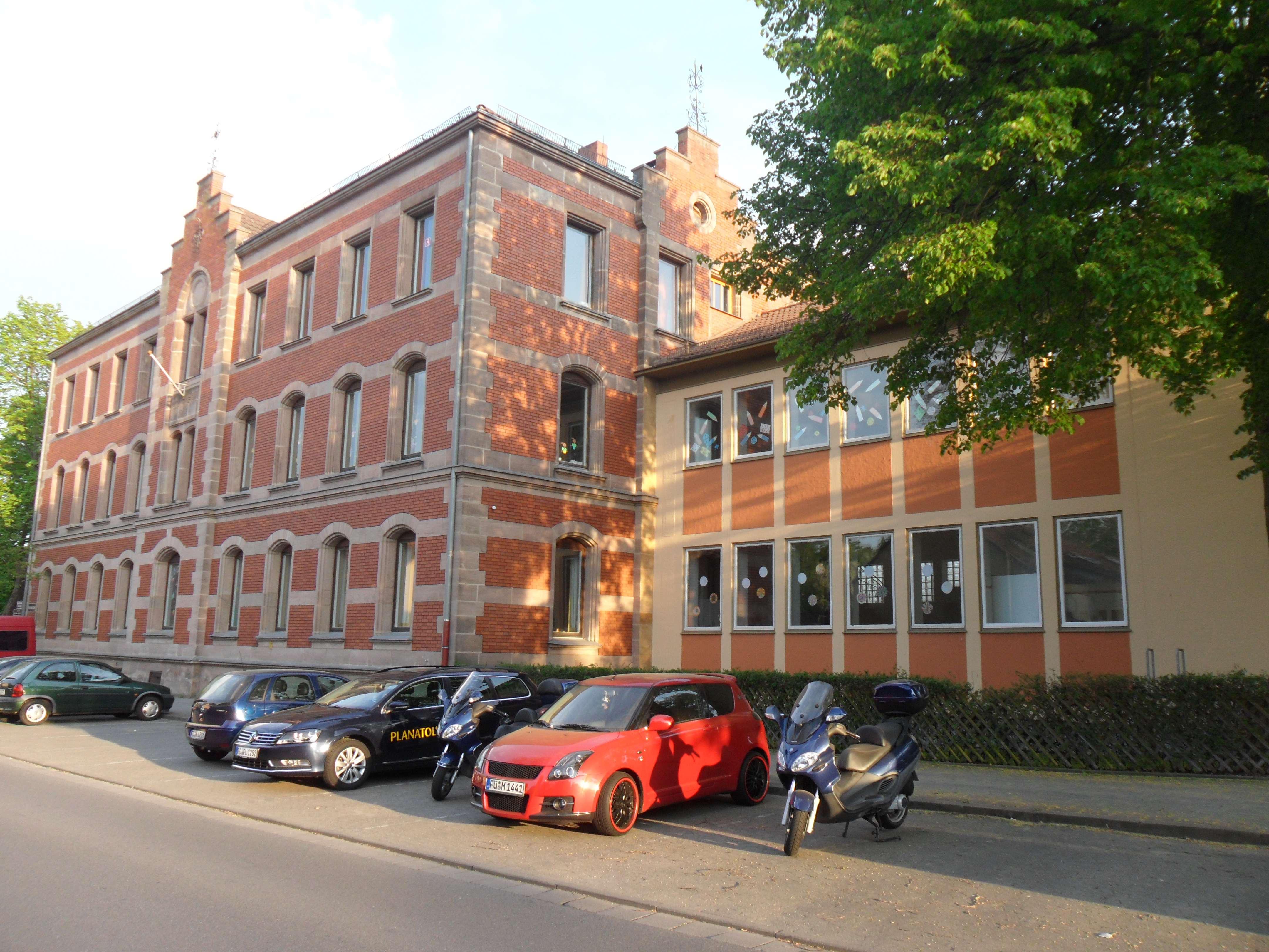 Grundschule Stein (ehemaliges Waisenhaus) Mühlstraße 29 01